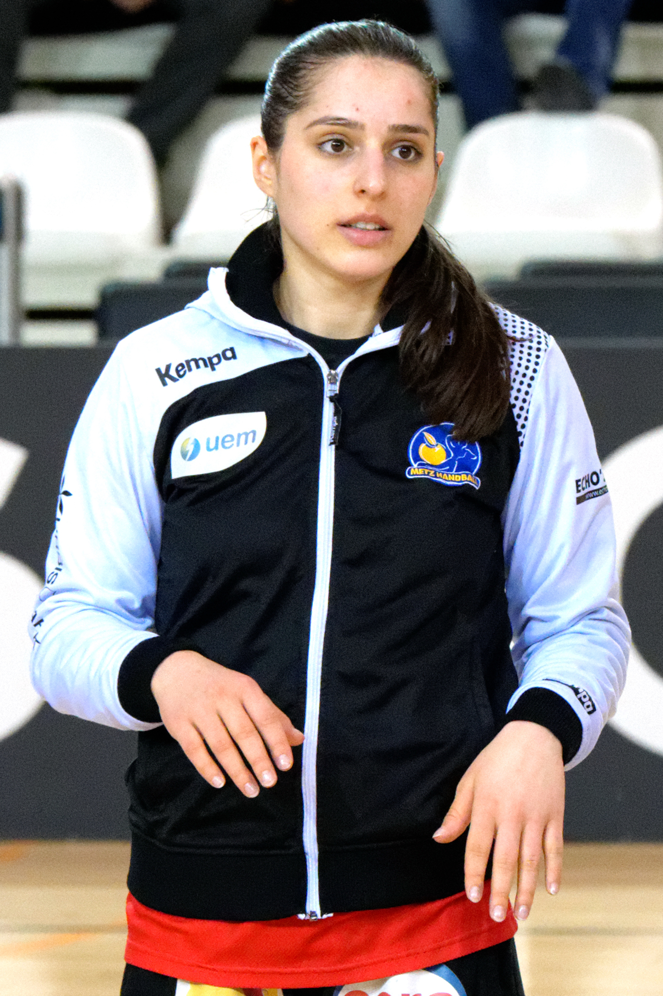 Marina Rajcic , le 31 janvier 2016 lors du match Issy Paris Hand / Metz Handball pour le compte de la 14e journée. Au stade Robert Carpentier à Issy-les-moulineaux.